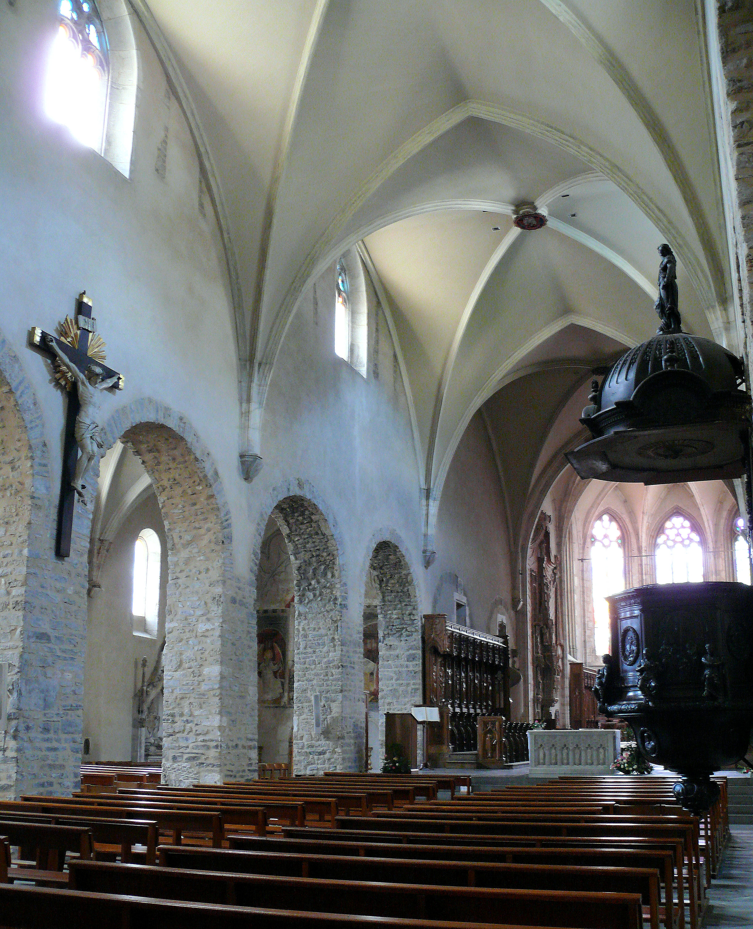 Cathédrale Saint-Jean-Baptiste de Saint-Jean-de-Maurienne - Elévation de la nef